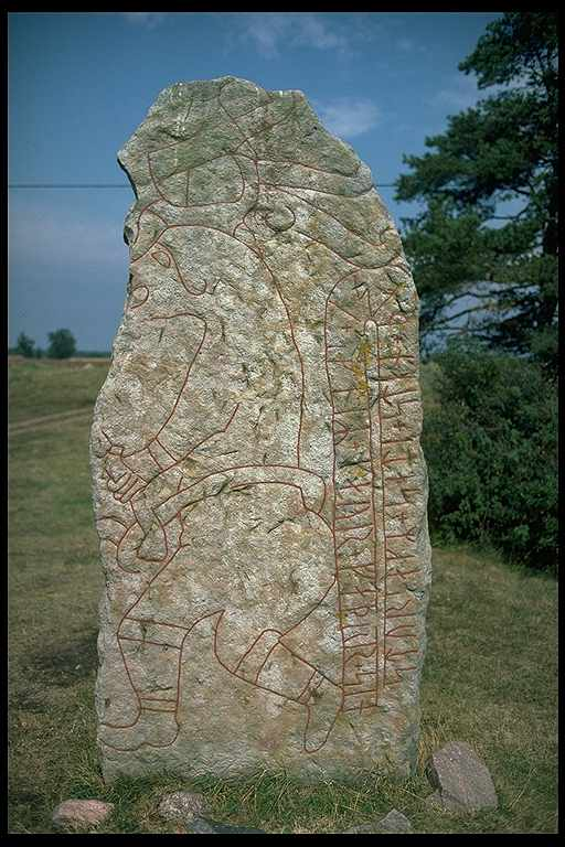 Källby 23:2. Inskriften lyder: Styrlag (Styrlaug) satte denna sten efter "kaur", sin fader. Motiv: Vg56 Källbyås Nyckelord: Runor Kategori: Runristning/runsten Källby 23:2. Inskriften lyder: Styrlag (Styrlaug) satte denna sten efter "kaur", sin fader.